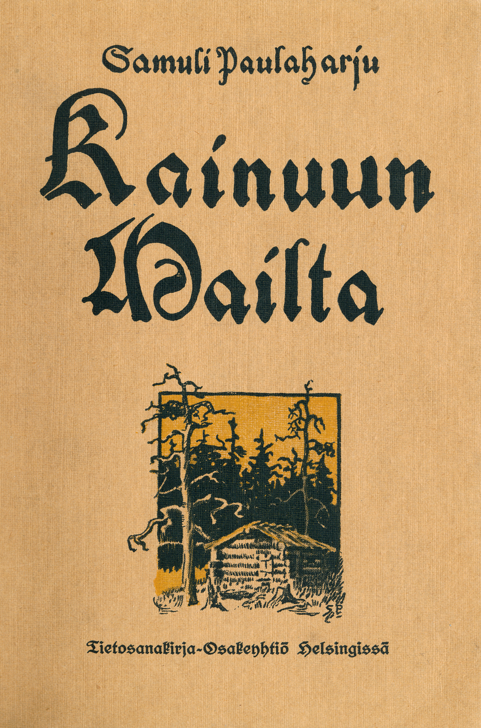 Samuli Paulaharjun teoksen Kainuun mailta etukansi.